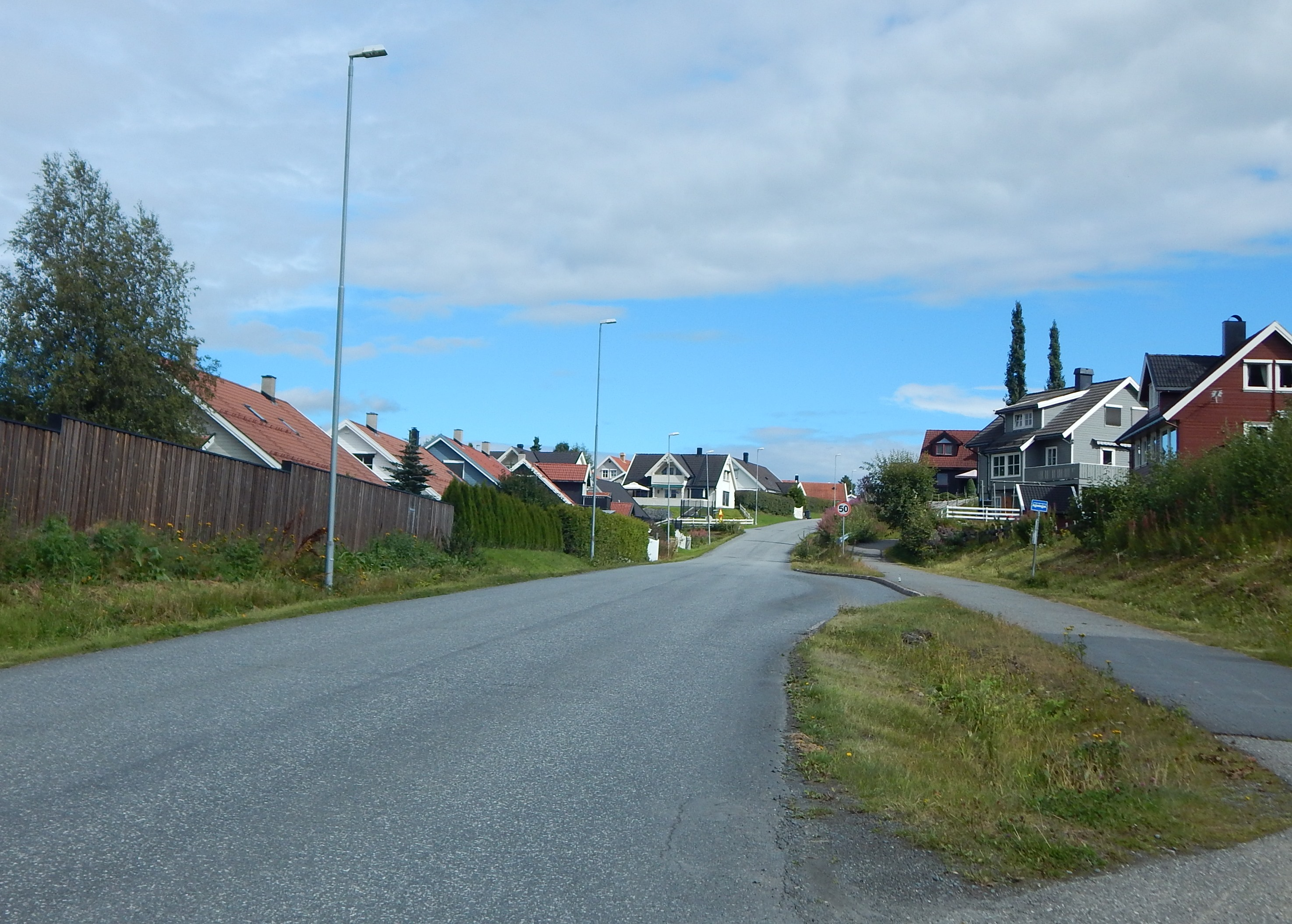 Røyslivegen med boligbegyggelse